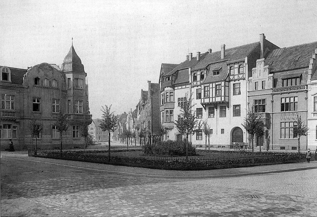 Düsseldorf, Drakeplatz 1905 mit Sicht in die Wildenbruchstraße. Links an der Ecke Haus Wildenbruchstraße 67. Häuser am Drakeplatz von links nach rechts: Nr. 5 und 4 Häuser des Bildhauers Albert Pehle und Nr. 3 (unter Denkmalschutz).